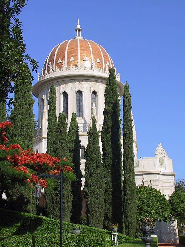 Schrein des Bab (Hängende Gärten der Baha'i in Haifa, Israel), GNU-FDL, Bildquelle: Michael Paul Gollmer (selbst fotografiert)